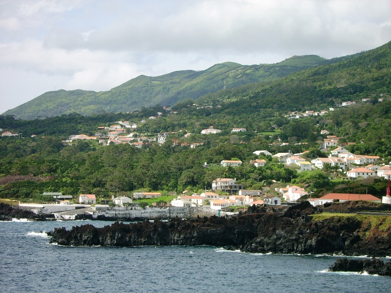 Vista parcial da costa da Urzelina, Velas, ilha de São Jorge, Açores.